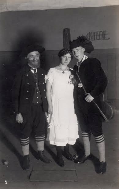 Anny Wienbruch mit zwei unbekannten Männern